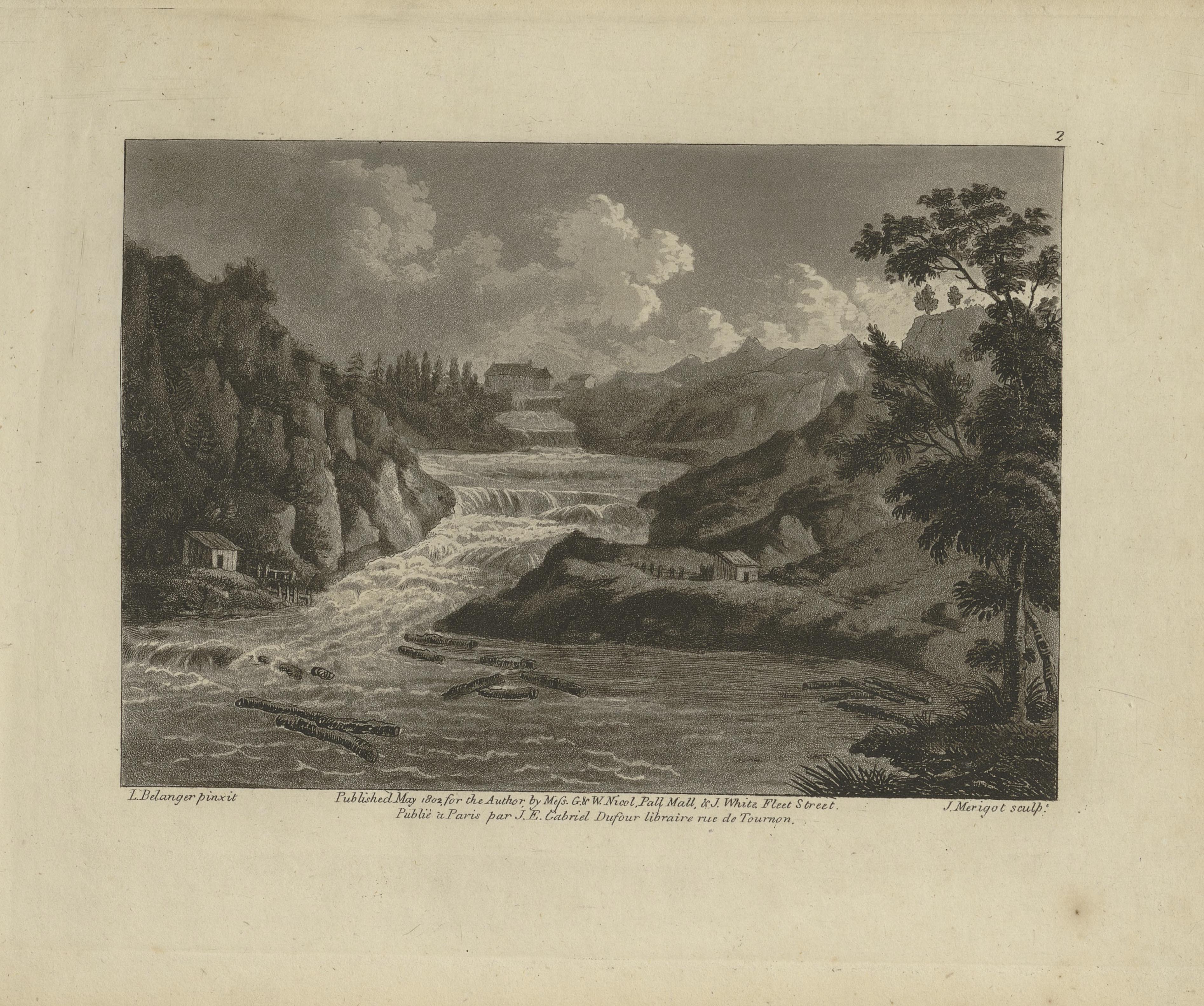 Vue des Chutes de Trollhætta, prise au-dessous de la dernière appelée Helvert's Fall, sur un Bord élevé du Fleuve Götha, duquel on aperçoit le magnifique Amphithéatre qu'elles forment. Illustrasjon hentet fra boken "Voyage pittoresque de Scandinavie" av Saint-Morys, Charles-Étienne Bourgelin Vialart de og utgitt av [s.n.][Paris] : [s.n.], [1802] ([Paris], [1802]) See also Voyage pittoresque de Scandinavie : cahier de vingt-quatre vues, avec descriptions